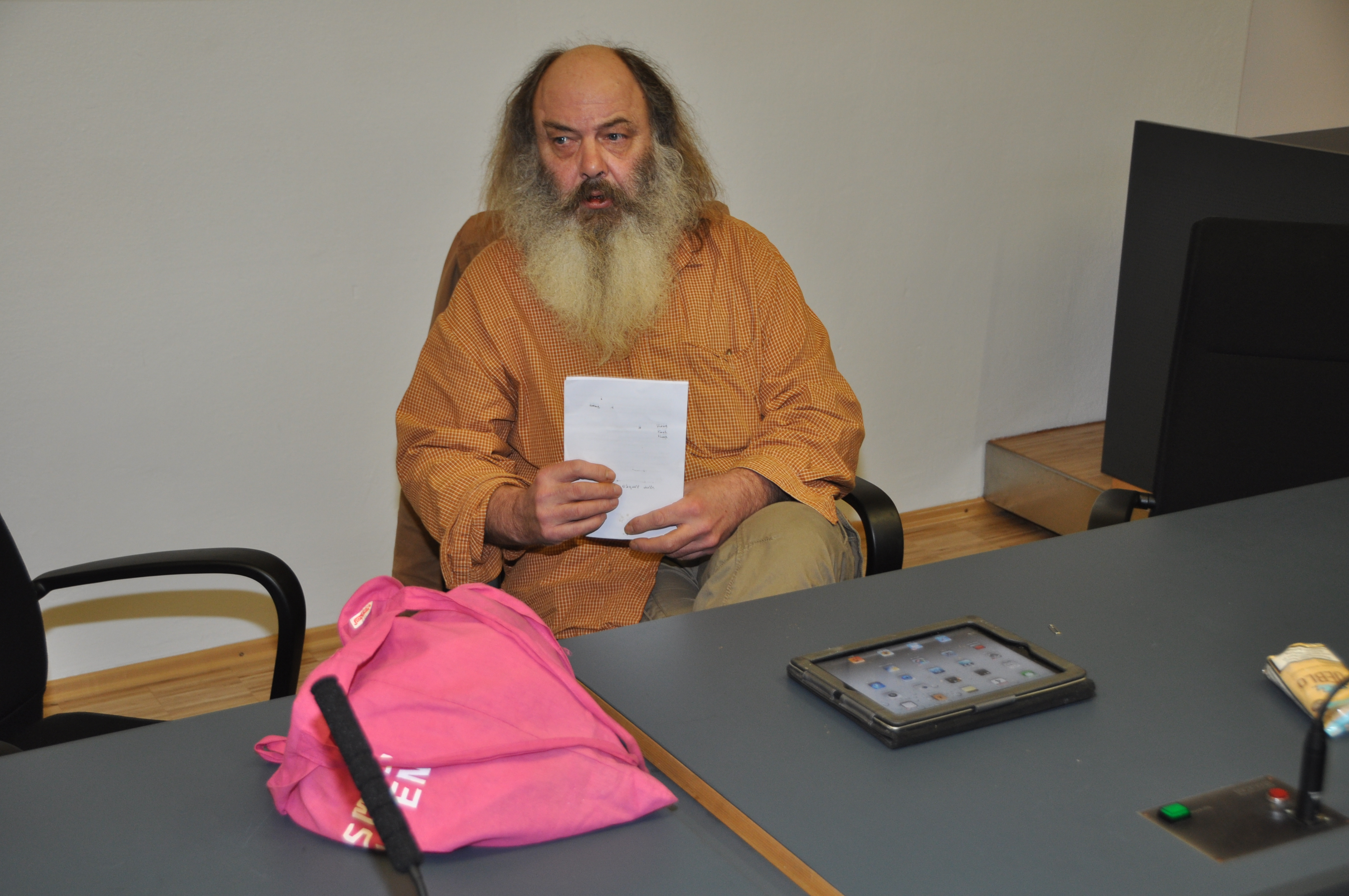 Lothar König kurz vor Beginn des Prozesses gegen ihn am Amtsgericht Dresden wegen schweren Landfriedensbruchs